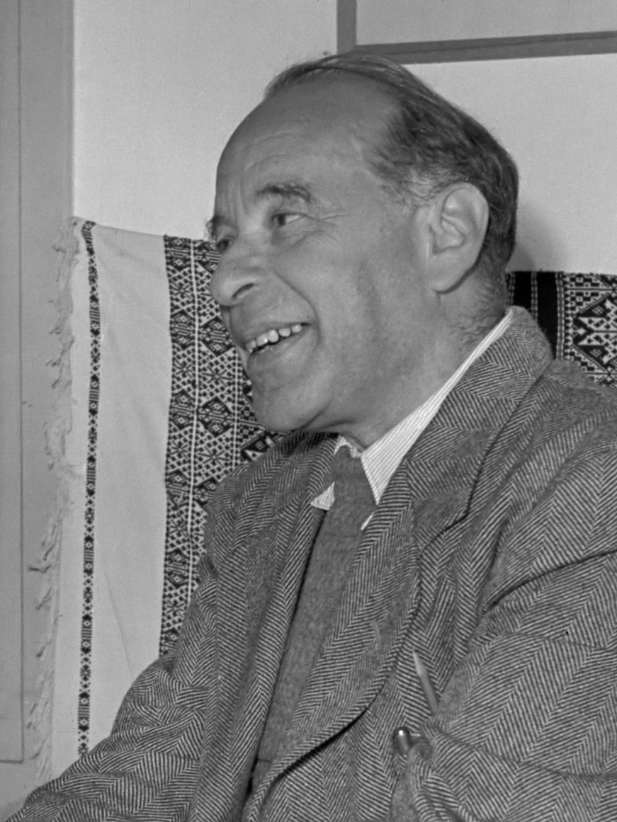 Israël 1948-1949: kinderdorp Ben Shemen. Dr. Siegfried Lehmann, stichter en leider van het kinderdorp Ben Shemen 1 januari 1948